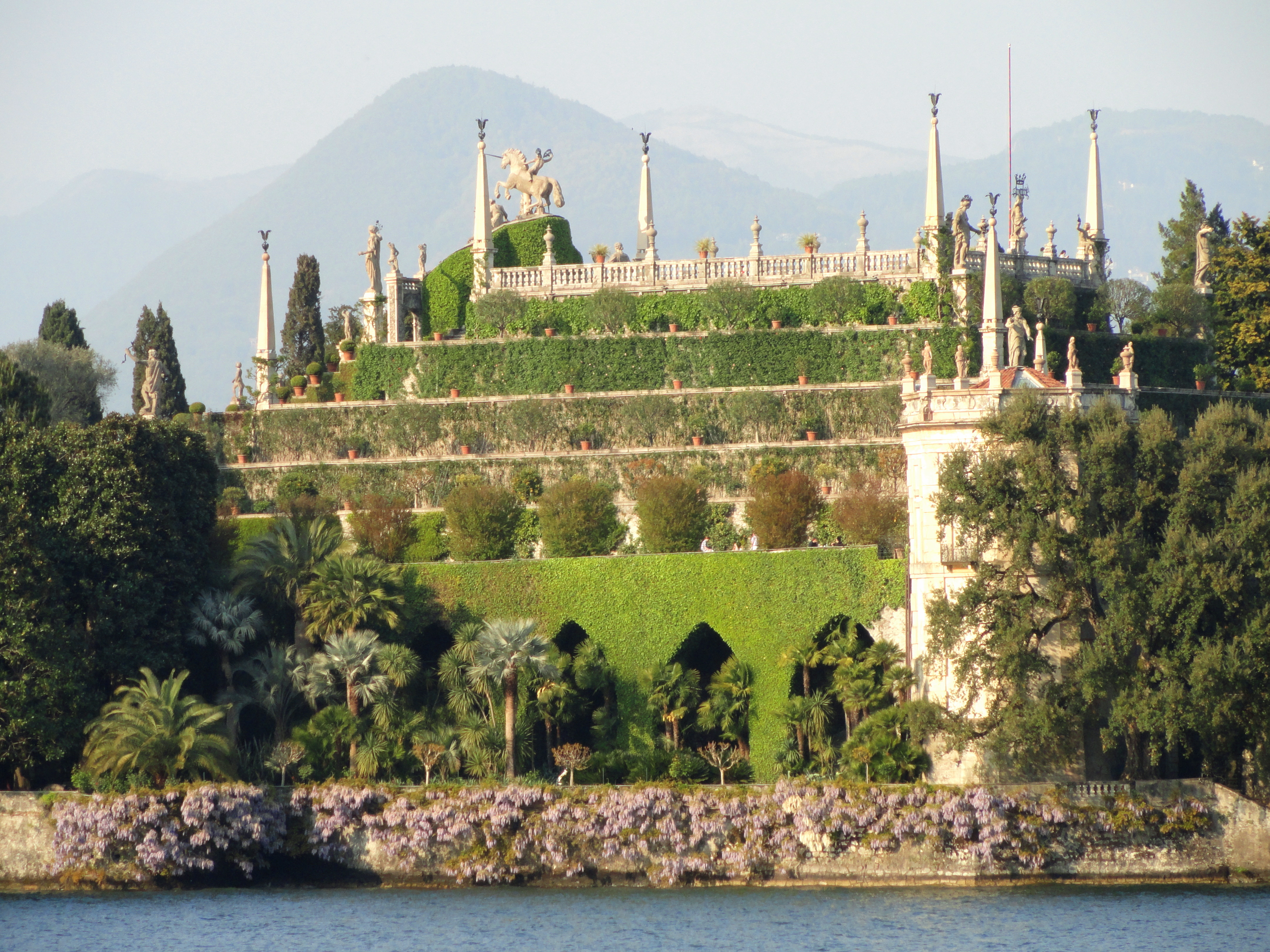 Isola Bella (Stresa), Lake Maggiore, Italy.